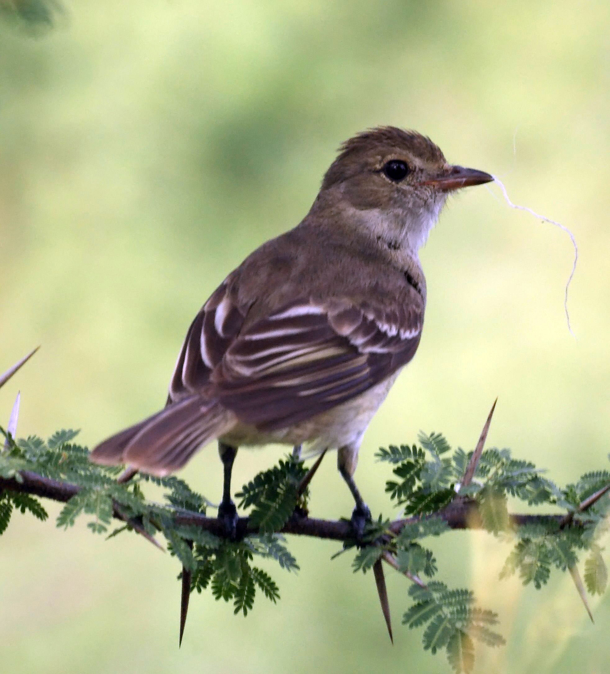 Caribbean Elaenia